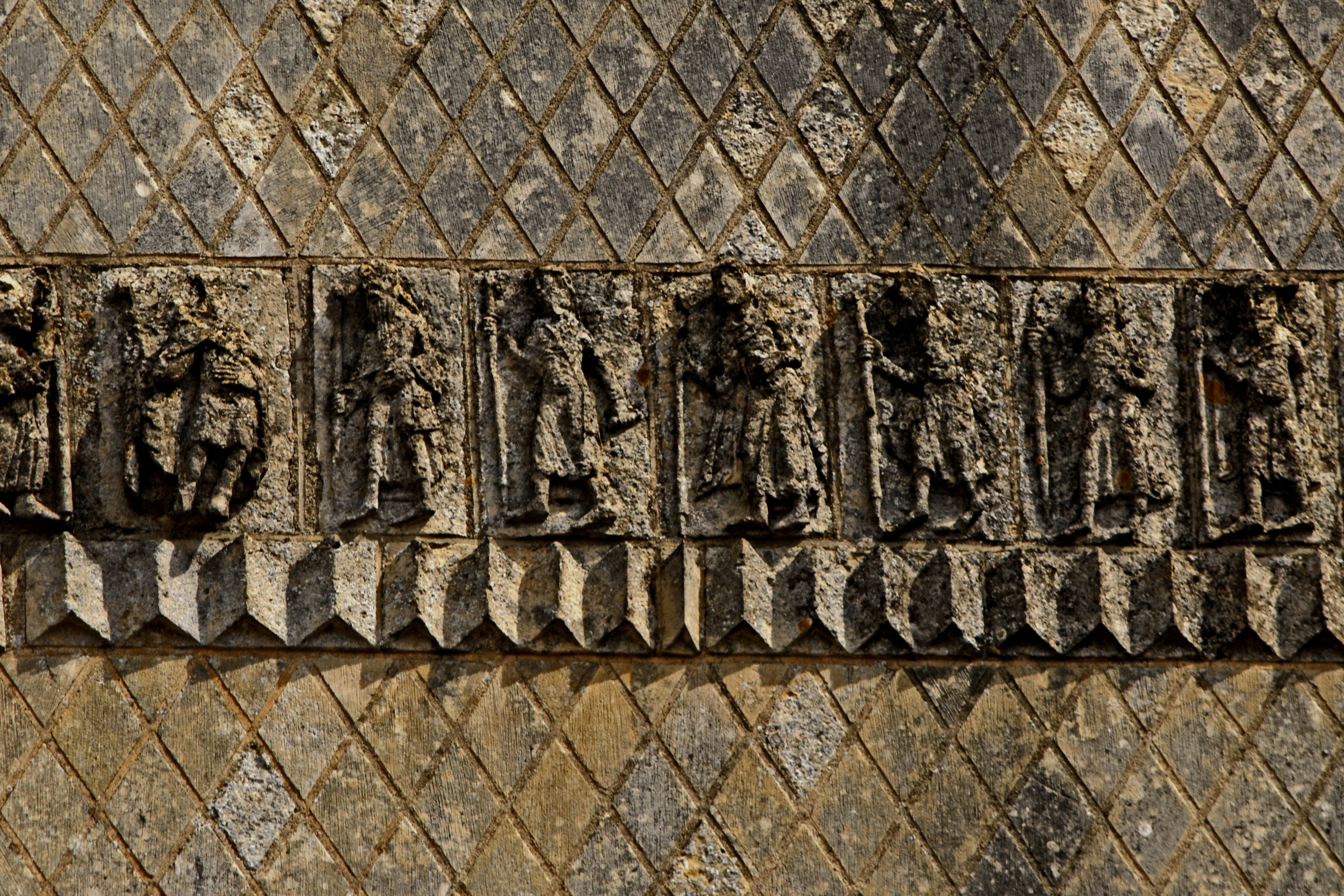 Saint-Jouin-de-Marnes, Auferstandene rechts der Mitte